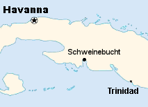 Veränderte Version von welches "public domain" ist und ursprünglich aus dem CIA World Fact Book stammt und von Thire übersetzt wurde -- Spooner 16:32, 24. Apr 2005 (CEST)